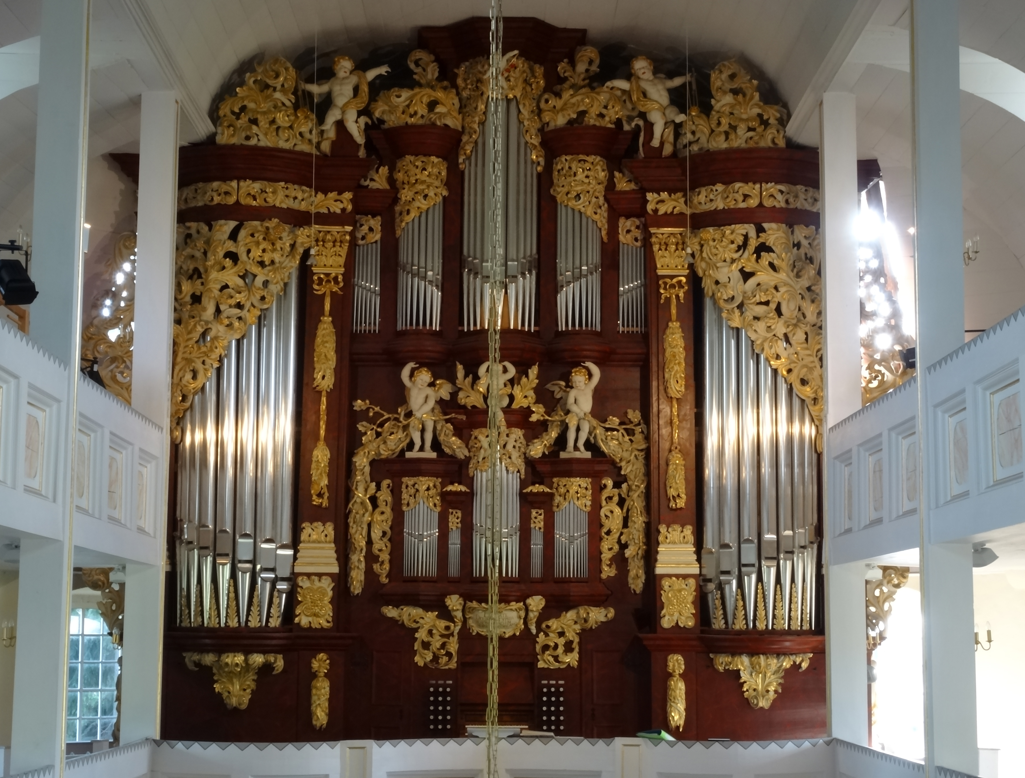 Die Stertzing-Orgel von 1702 in St. Petri (Büßleben) stand vor 1811 im Benediktinerkloster St. Petri auf dem Erfurter Petersberg.